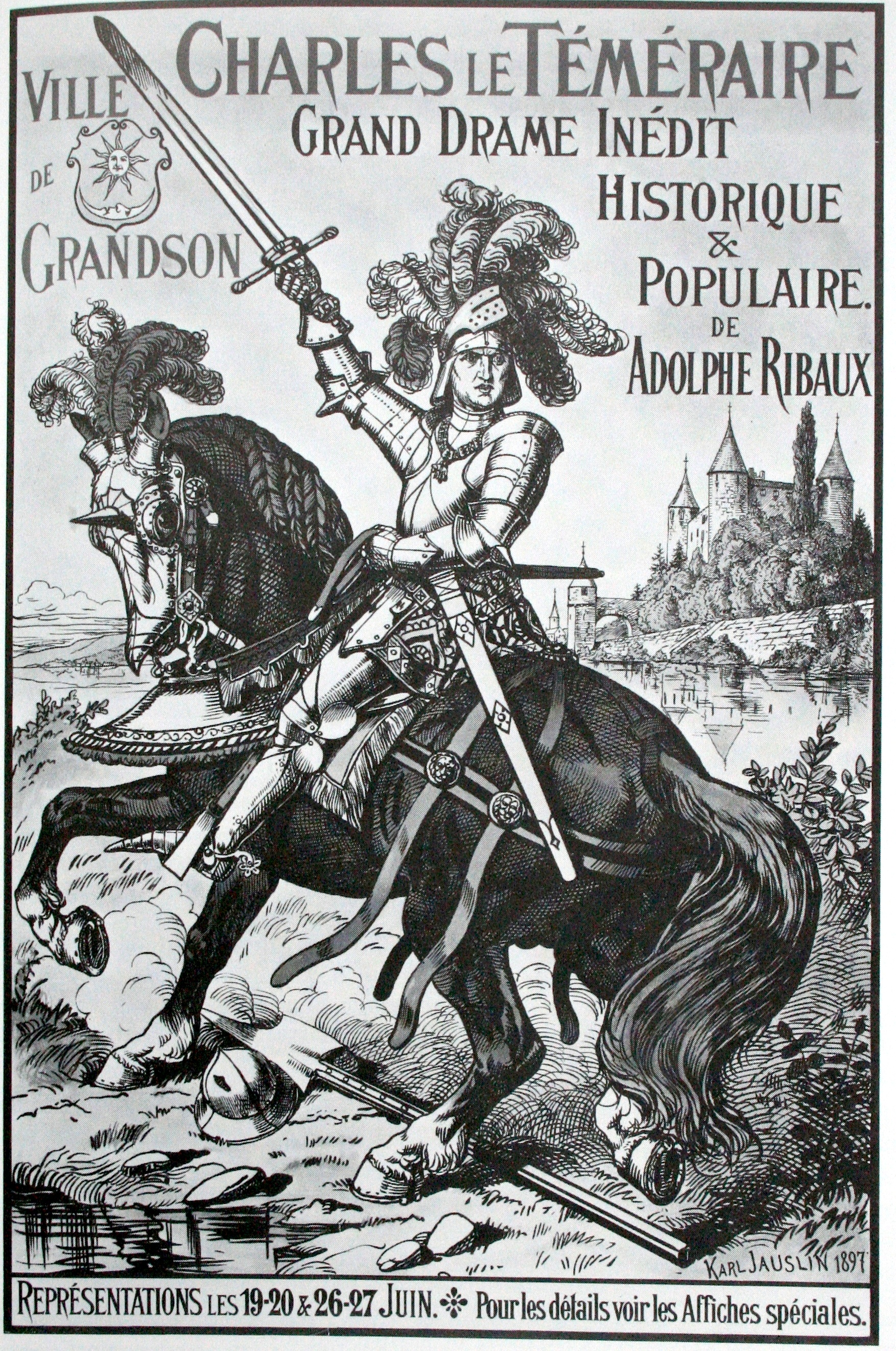 Plakat für Volksschauspiel, Chromolithografie, von Karl Jauslin, 125x83 cm, 1897